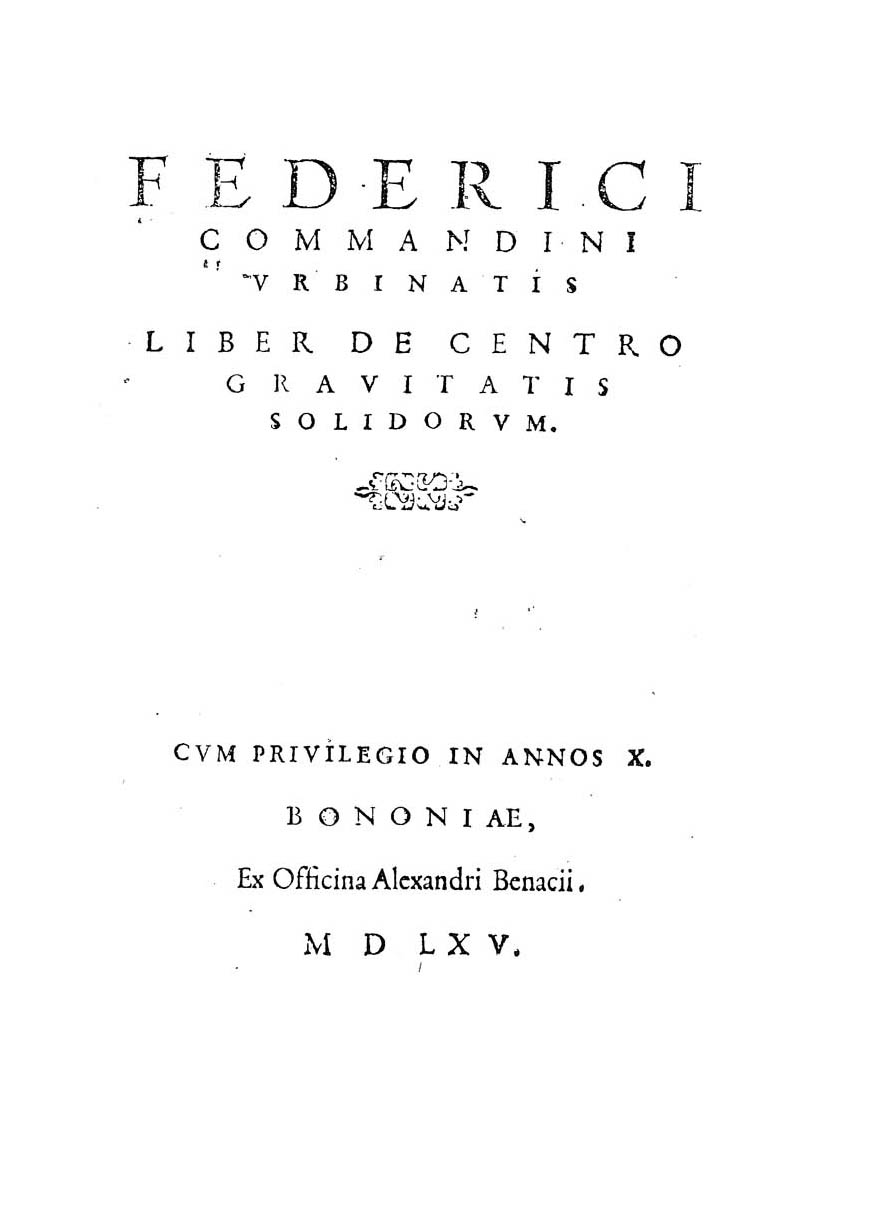 Federici Commandini Vrbinatis Liber de centro grauitatis solidorum. - Bononiae : ex officina Alexandri Benacii, 1565 (Impress. Bononiae). - [4], 47, [1] c. : ill. ; 4º .